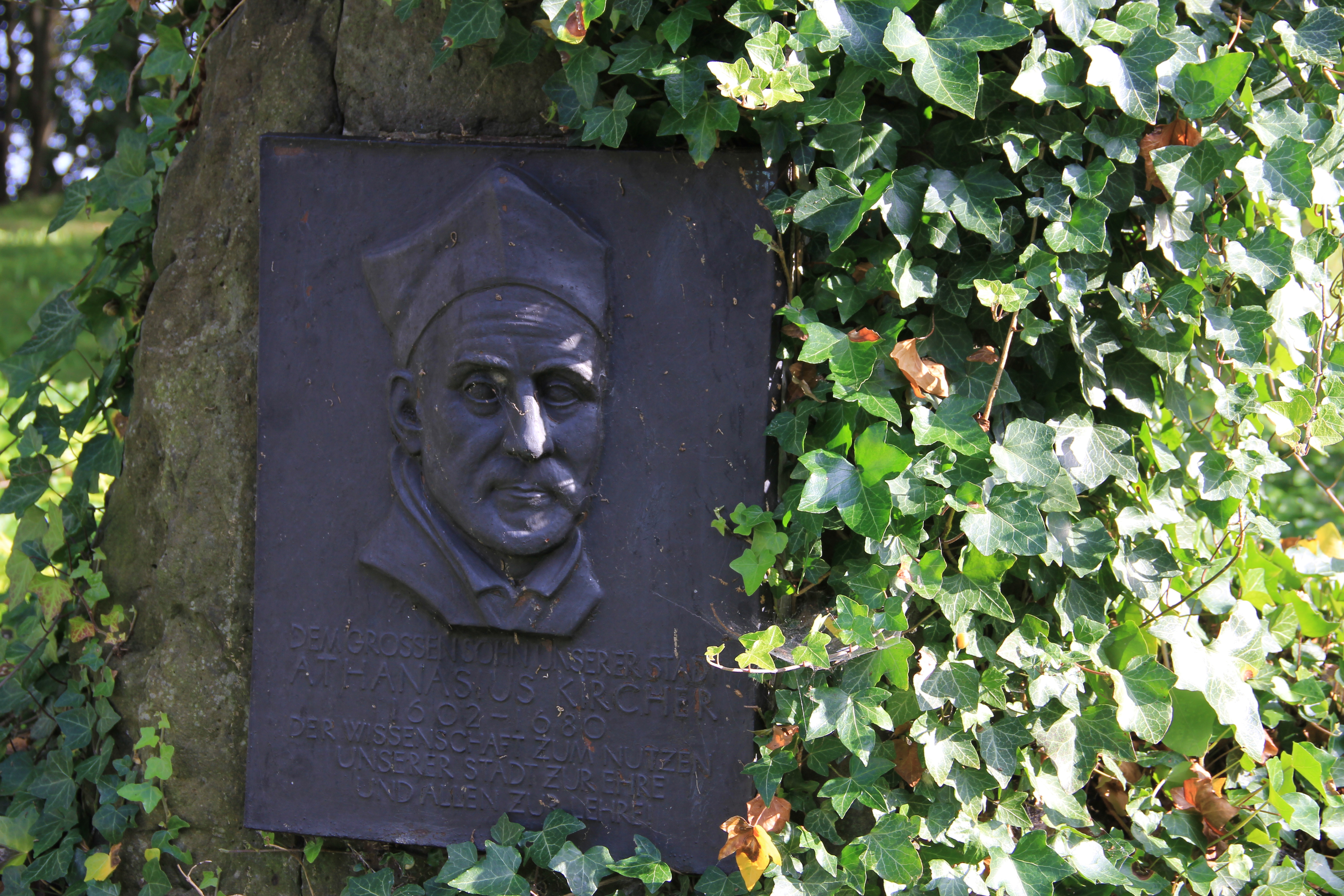 Gedenkstein zu Ehren von Athanasius Kircher im Gangolfipark in Geisa